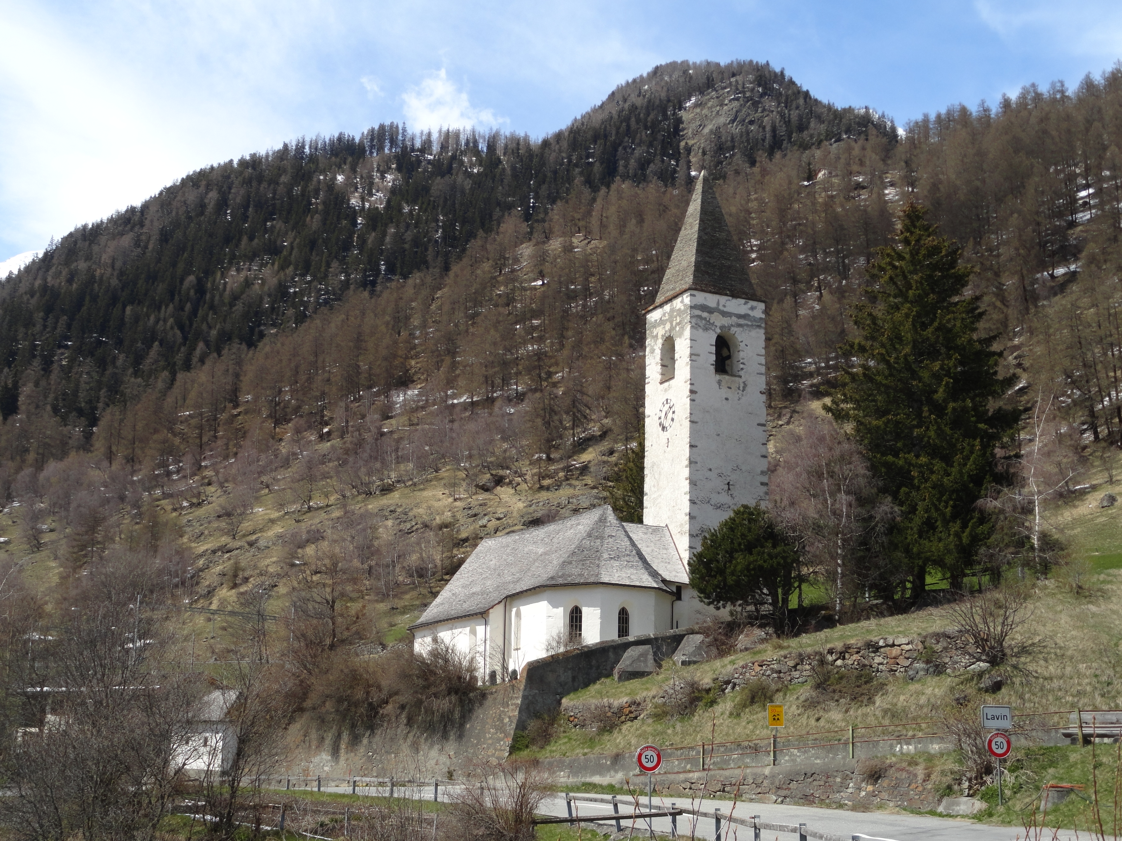 Reformierte Kirche Lavin Ansicht von Osten